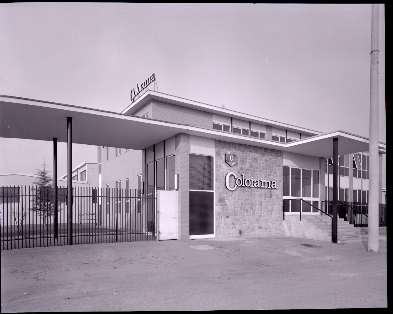 Settala. Caleppio di Settala. Stabilimento Colorama. Esterni e interni. Entrata, impianti tecnici e depositi con barili d'inchiostro. Servizio fotografico : Settala, 1967 / Paolo Monti. - Buste: 19, Fototipi: 26 : Negativo b/n, gelatina bromuro d'argento/ pellicola ; 10x12. - ((Serie costituita da 19 buste sciolte di negativi identificati con i nn.: 13180, 13181, 13182, 13183, 13183bis, 13183ter, 13184, 13185, 13186, 13187, 13188, 13189, 13190, 13191, 13192, 13192bis, 13193, 13194, 13195. - Fonte: Agenda di Paolo Monti: Monti/ 3 aprile 1966 - 9 marzo 1971/ 12421-16823 (1966-1971), presso Archivio Paolo Monti. - Fonte: Fattura di Paolo Monti: IV. Commesse/ Fattura/ Colorama/ Fotografie vostro stabilimento (1967/05/05), presso Archivio Paolo Monti. 16 riprese in b/n con lastre 10x12